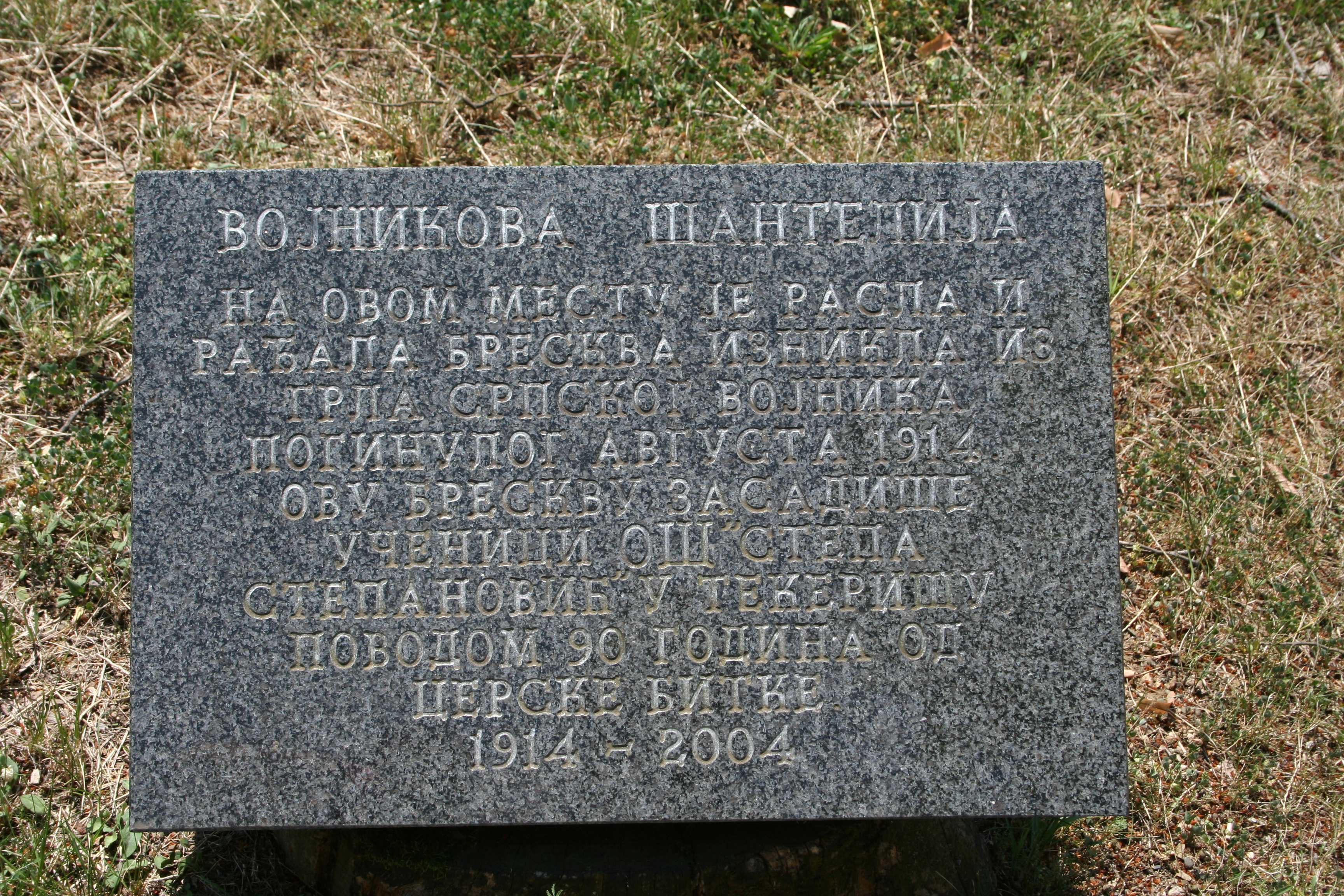 Spomen-kosturnica na Ceru